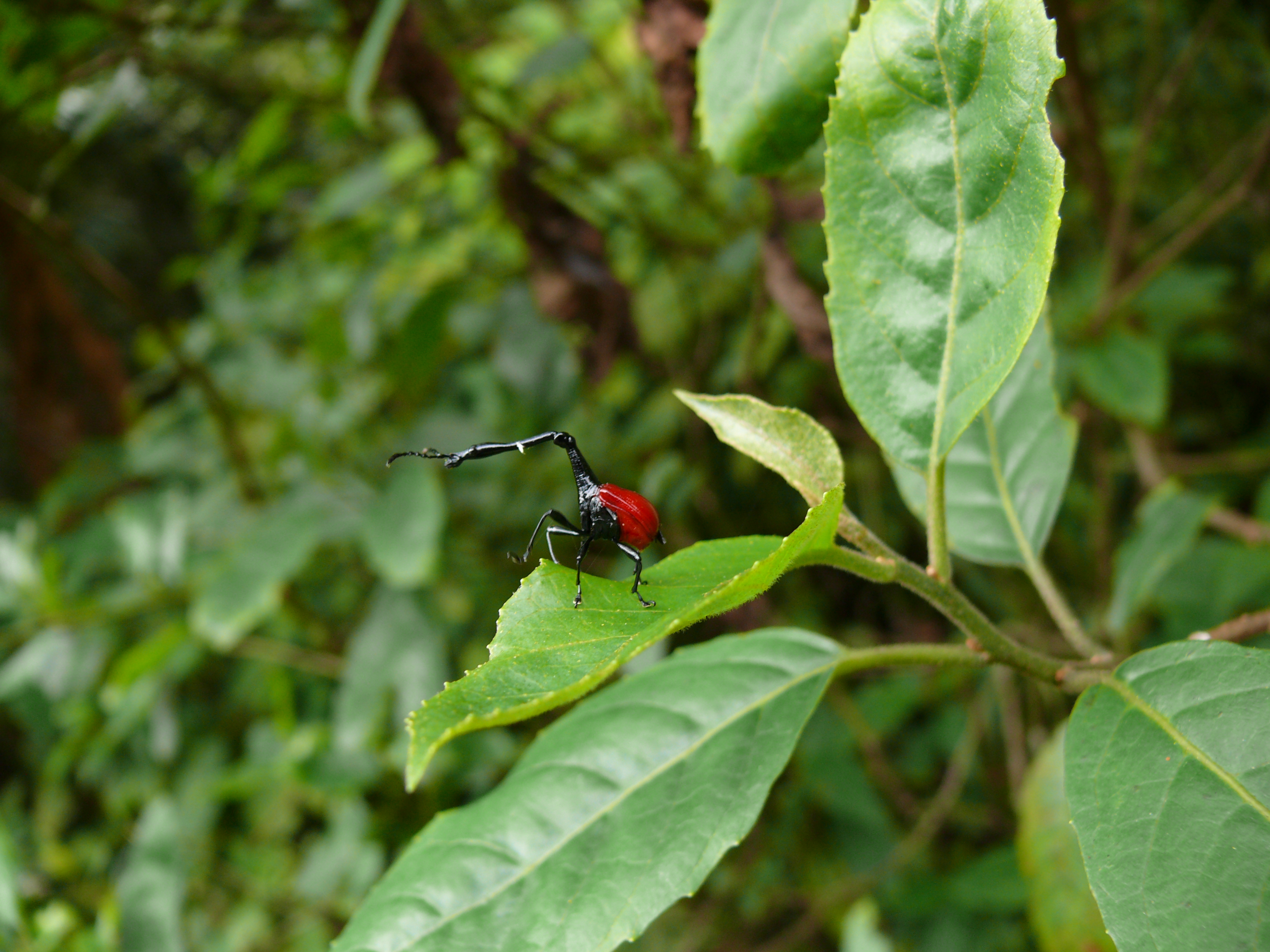 Coléoptère girafe Trachelophorus giraffa